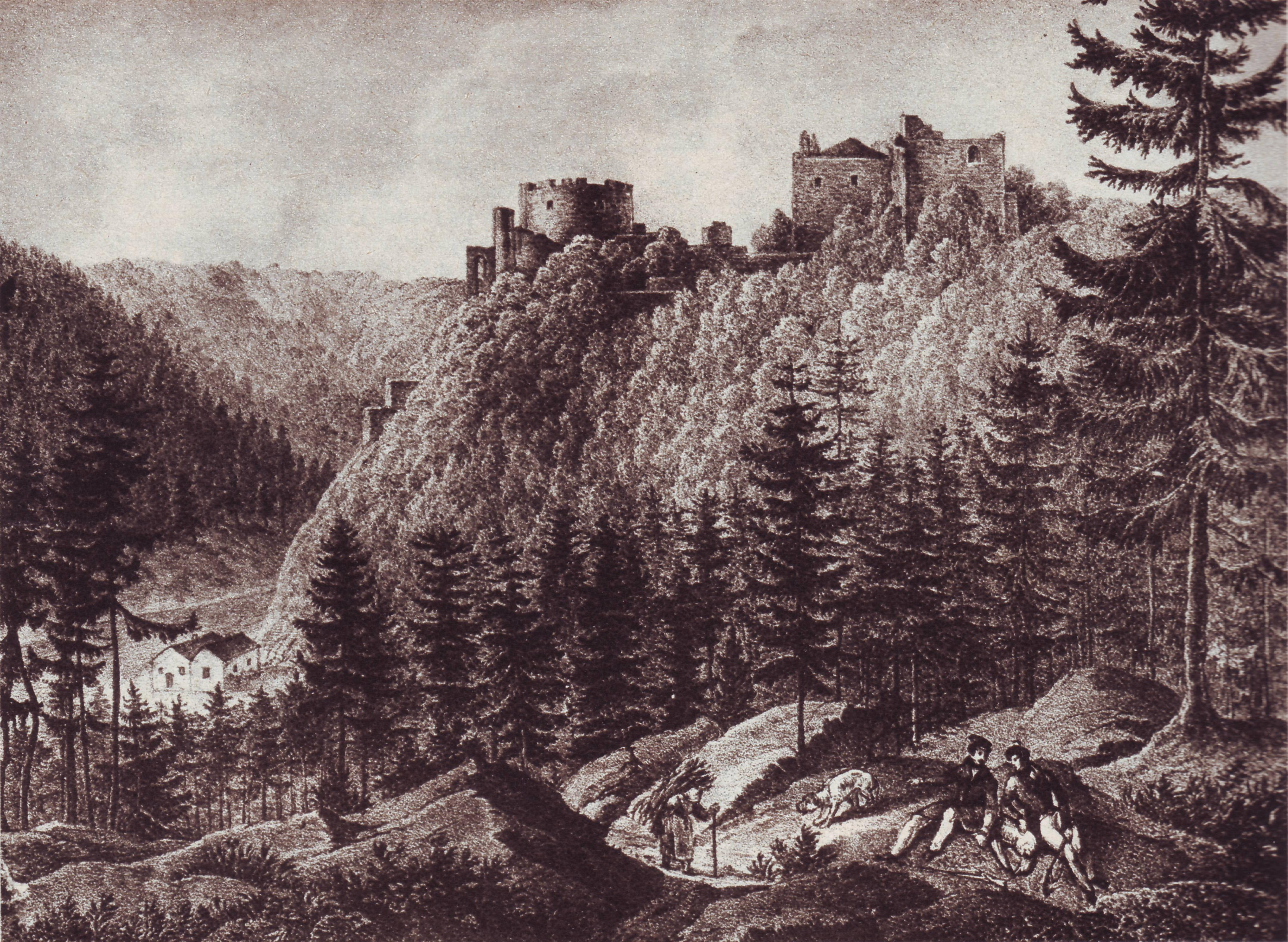 Podle zdroje jde o Nový Hrad u Blanska, rytina F. A. Hebera z roku 1848, ale jde o Nový Hrádek u Znojma. V uvedené publikaci došlo k hrubému omylu (nebyl jediný).